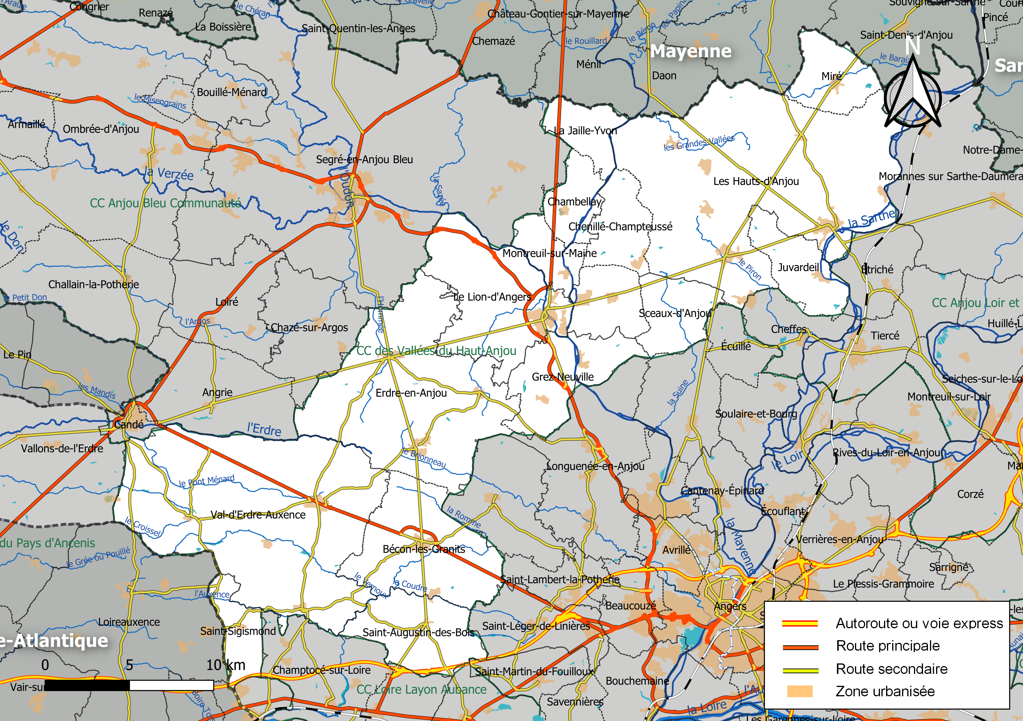 Carte géographique de la Communauté de communes des Vallées du Haut-Anjou, département de Maine-et-Loire, France. Composition au 1er janvier 2019.